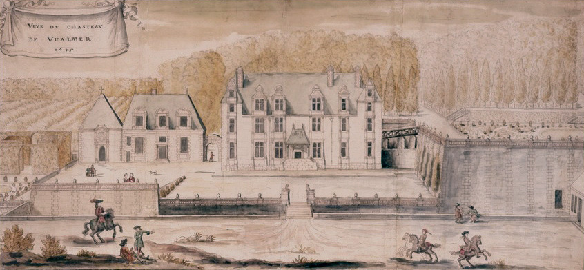 Aquarell des Schlosses Valmer, Indre-et-Loire